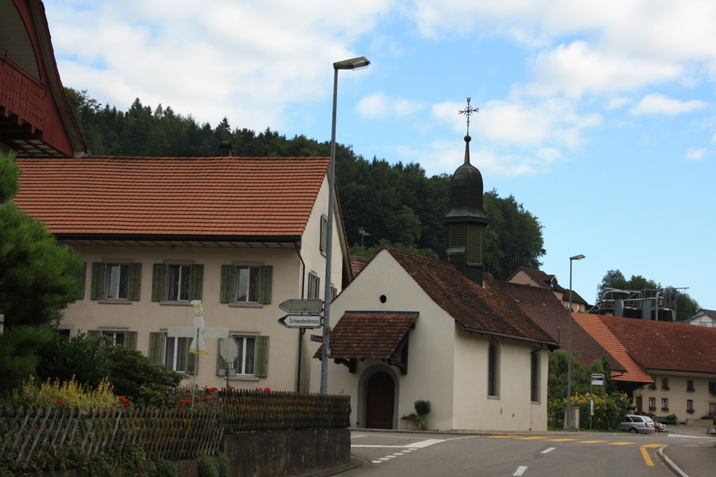 Weiler Hettenschwil, Gemeinde Leuggern, Aargau, Schweiz